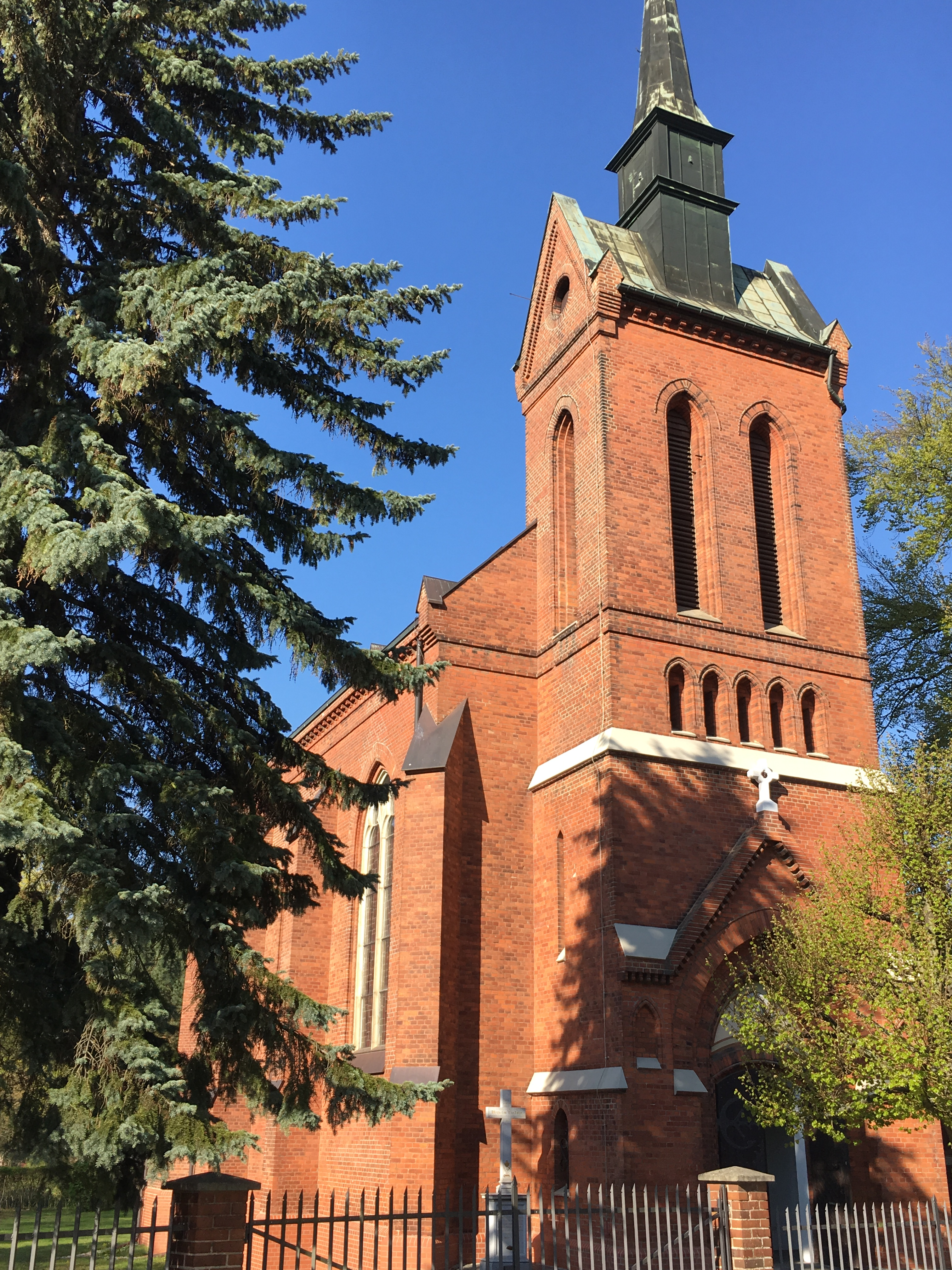 Katholische Kirche Spremberg Straßenansicht